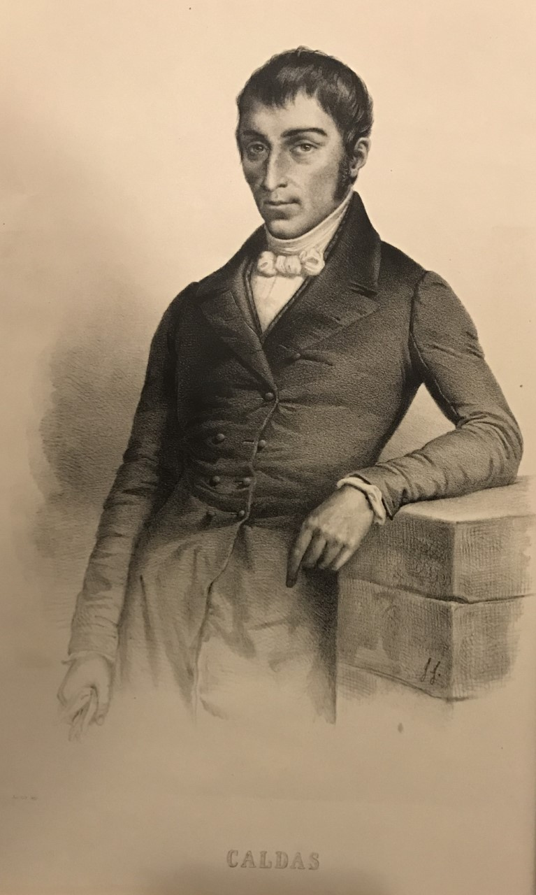 Grabado del prócer colombiano Francisco José de Caldas